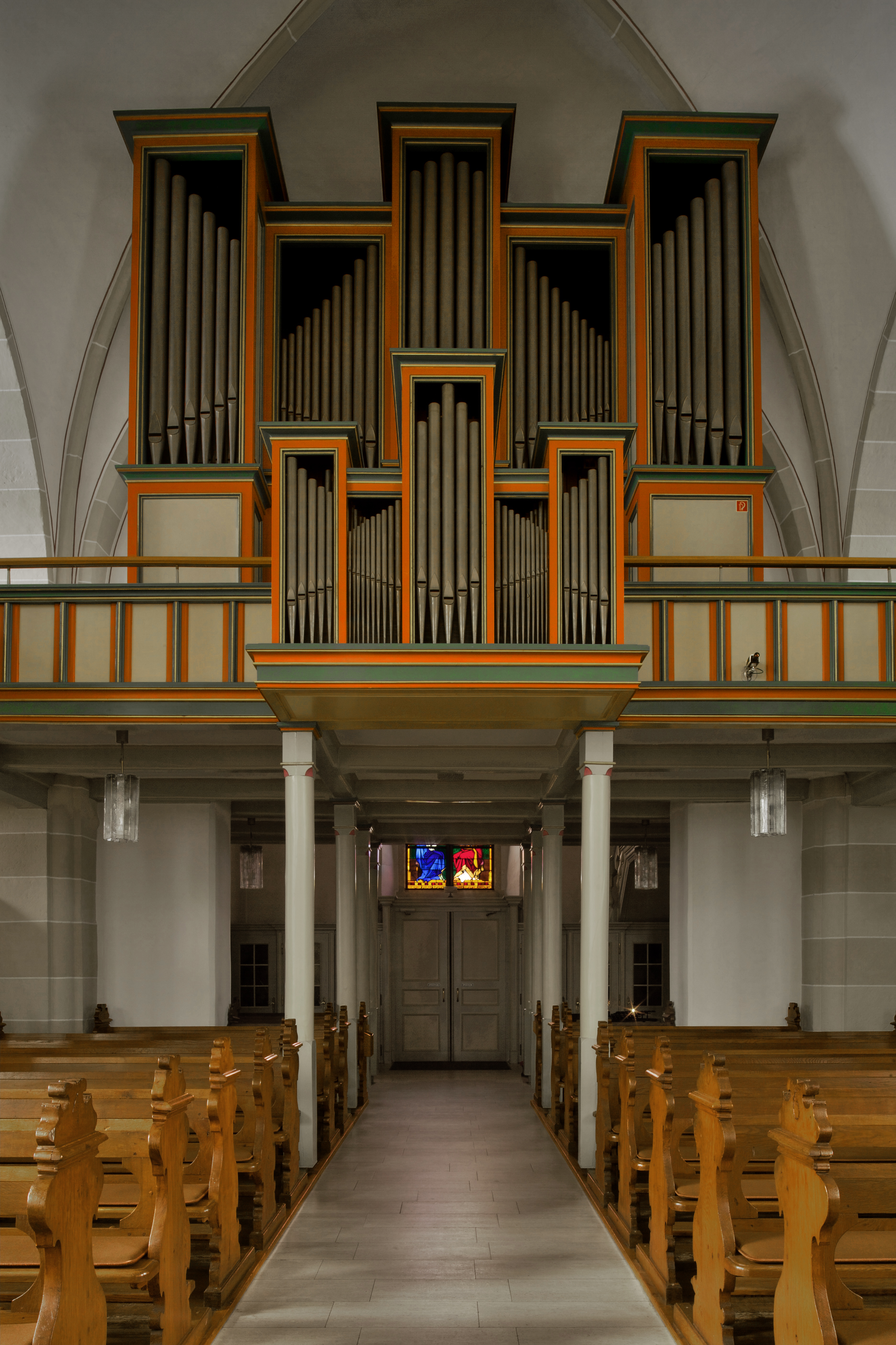 Hopsten St. Georg, Orgel This is a photograph of an architectural monument.